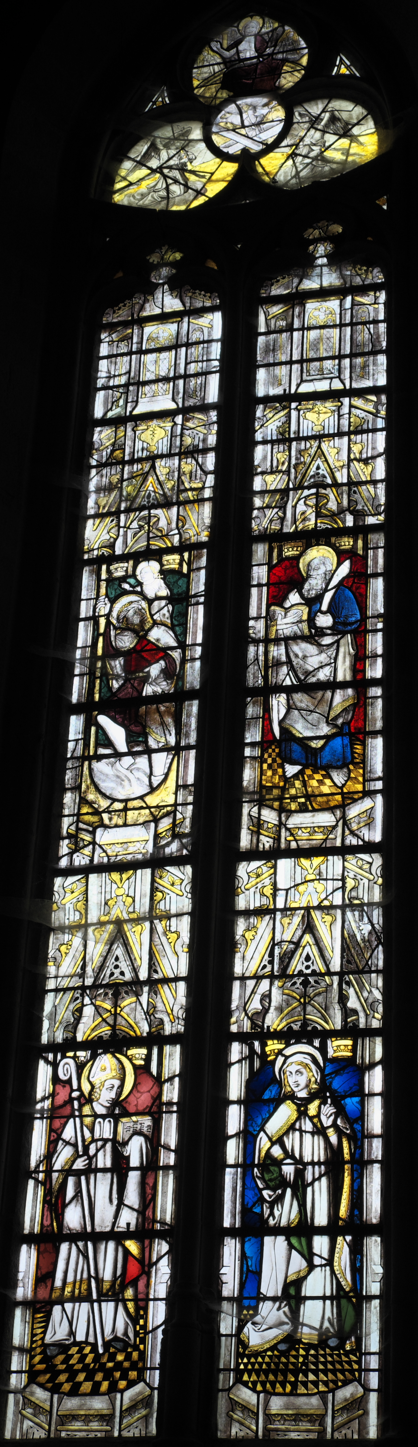 Stiftskirche Saint-Étienne in Eymoutiers im Département Haute-Vienne (Nouvelle-Aquitaine/Frankreich), Bleiglasfenster (Nr. 10) aus dem 15. Jahrhundert, Darstellung: Bischof und Heilige (unten), heiliger Christophorus (oben links), Apostel Bartholomäus (oben rechts)